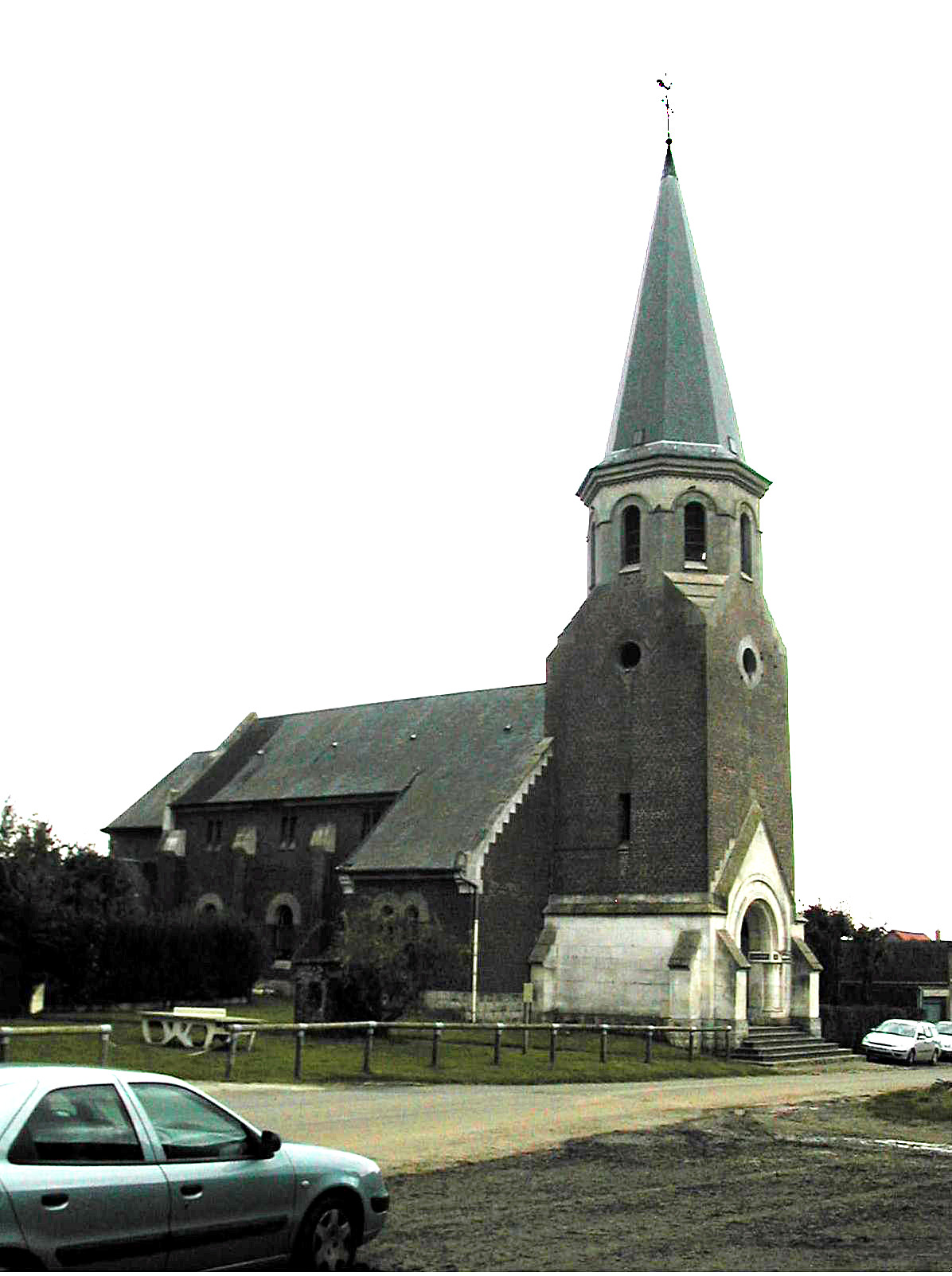 église Saint-Vaast de Biefvillers-lès-Bapaume.